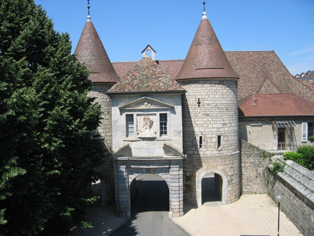 Porte Rivotte de Besançon (sortie direction Pontarlier)